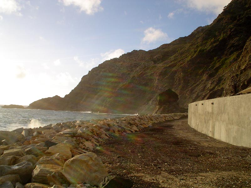 Amphitria - Vue extérieure